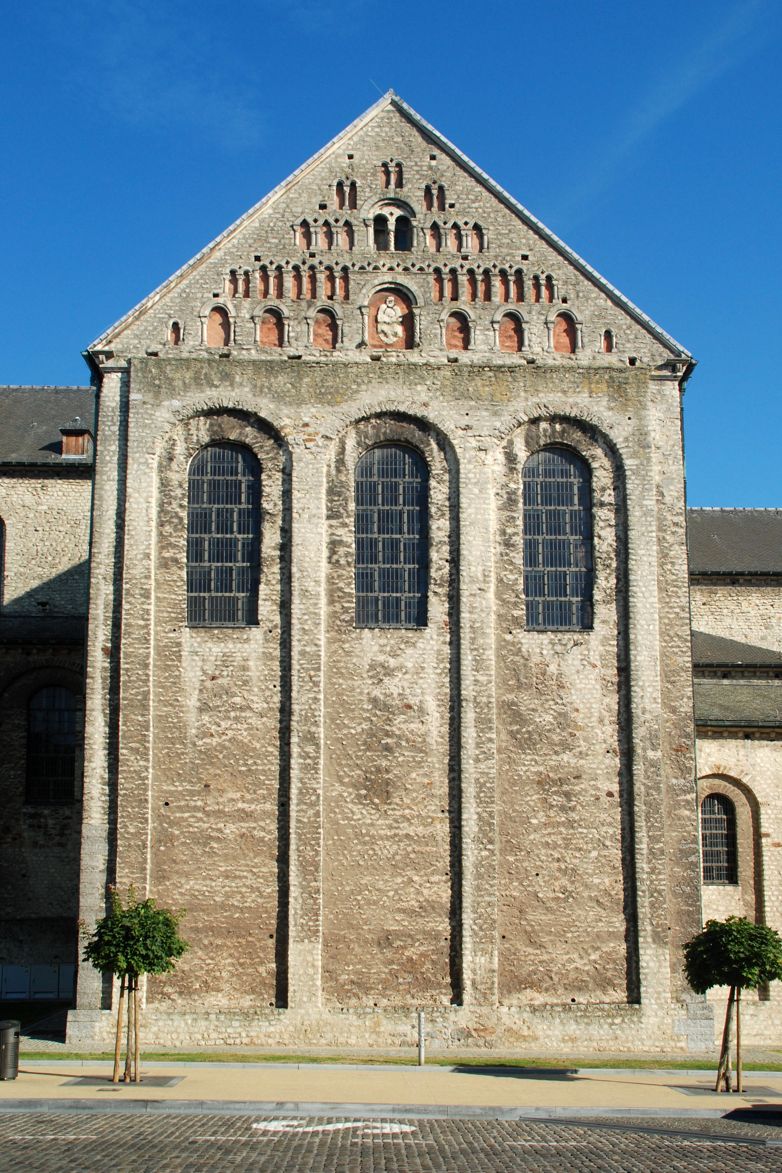 Belgique - Brabant wallon - Nivelles - Collégiale Sainte-Gertrude